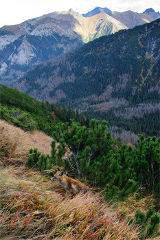 Lis w Tatrach